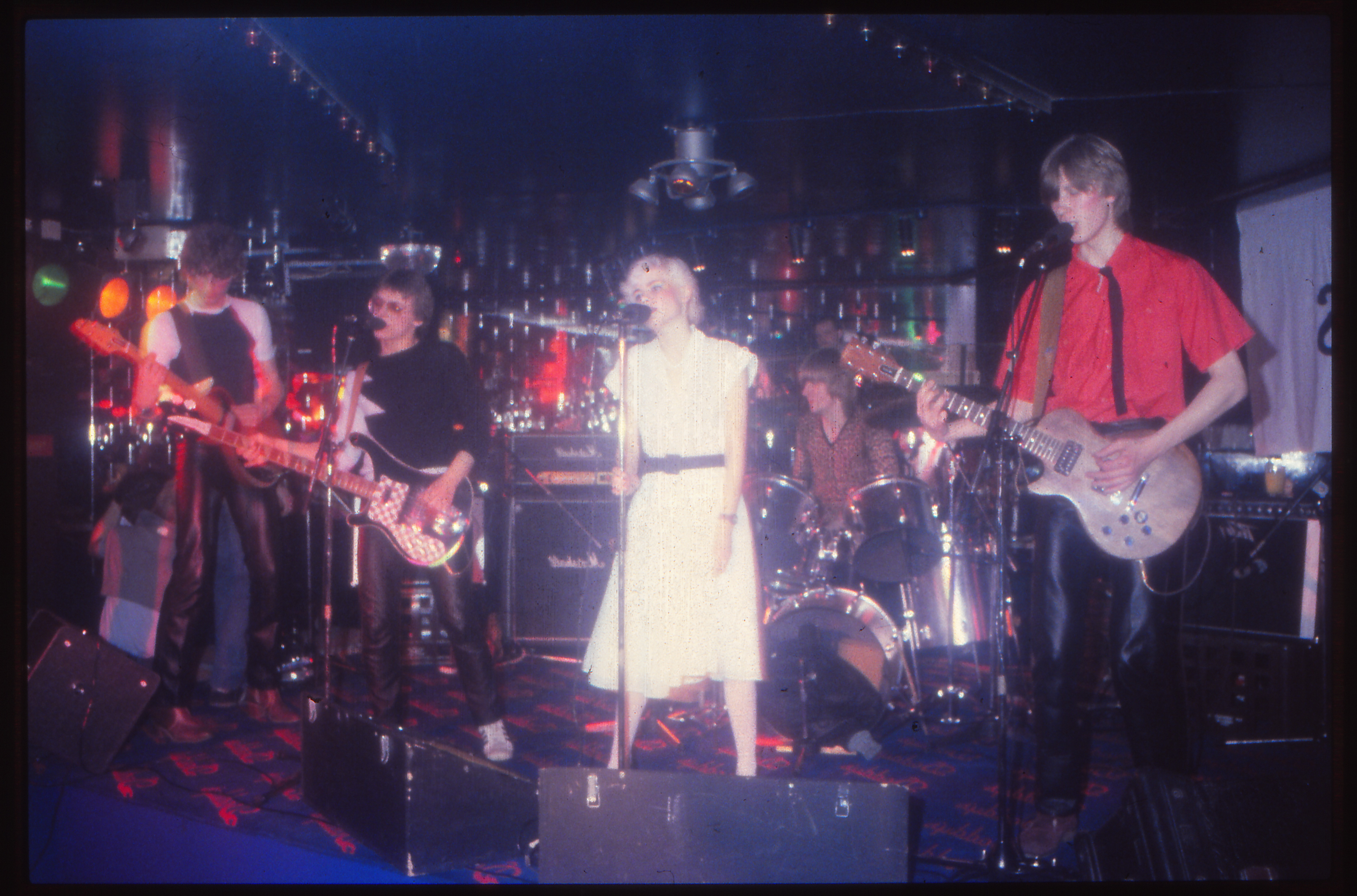 The Pin-ups anno 1980 at Daddy´s Dancehall